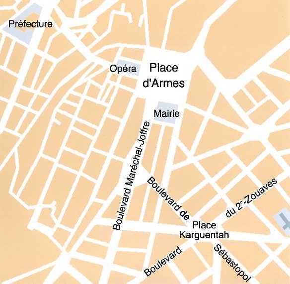 Plan très sommaire du centre ville d'Oran, avec juste 2 ou 3 noms de lieu